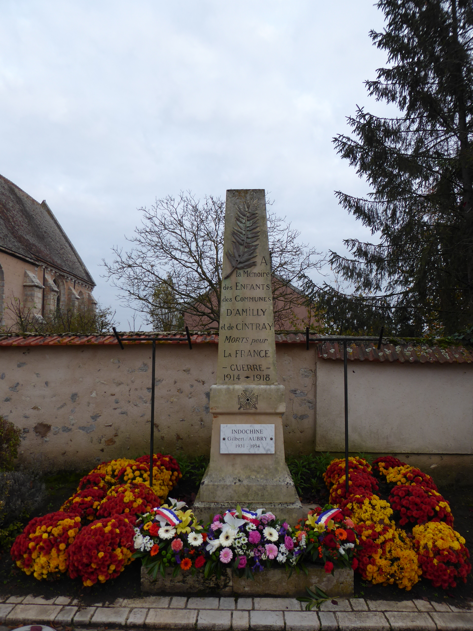 Monument aux morts d'Amilly, commun avec Cintray, Eure-et-Loir France.